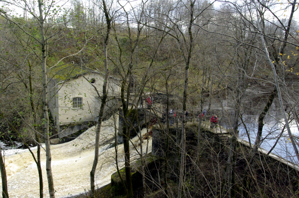 Kunda alumine ehk vana elektrijaam.